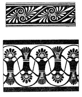 نموذج من الزخرفة الرومانية